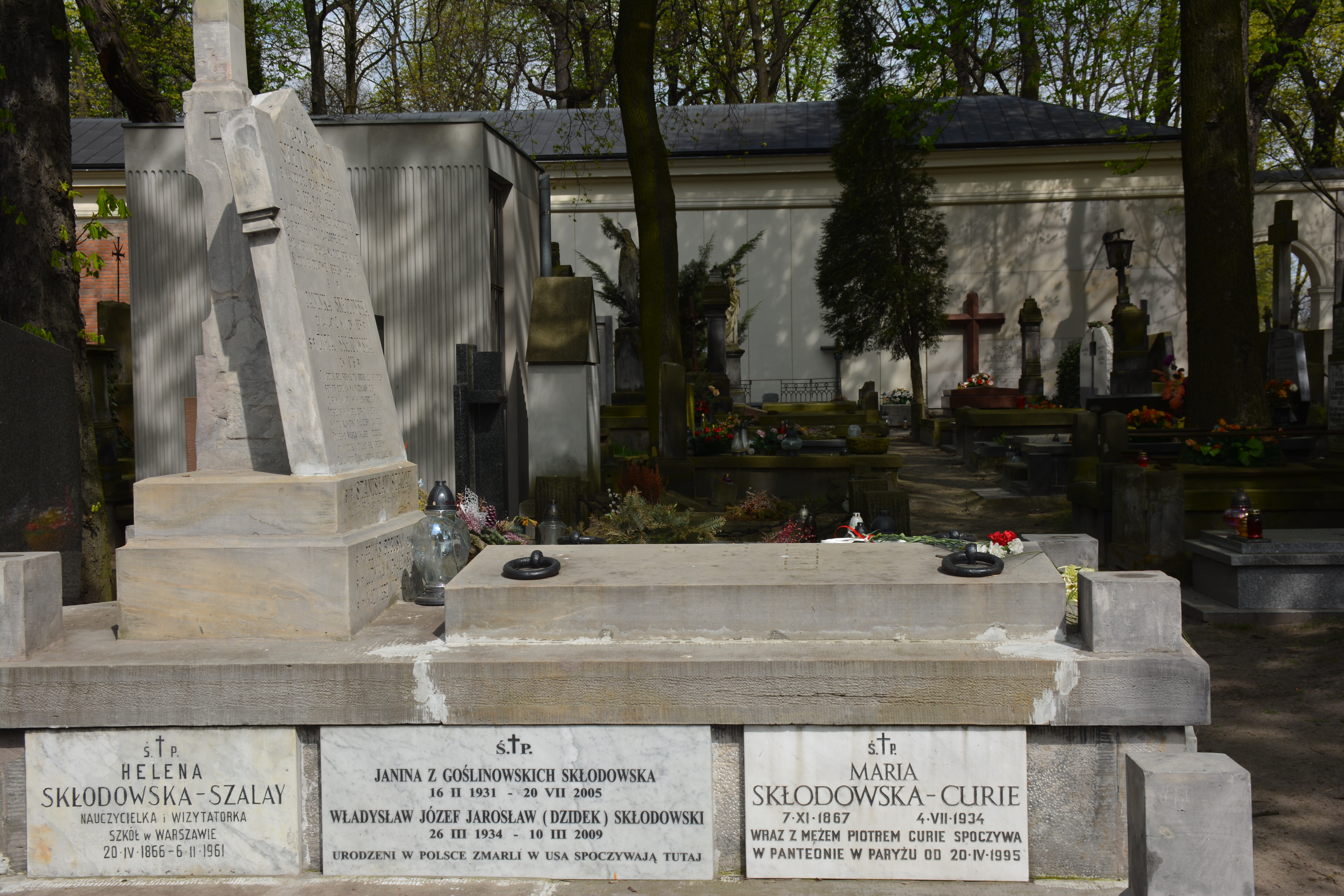 Powązki, Warszawa, Poland